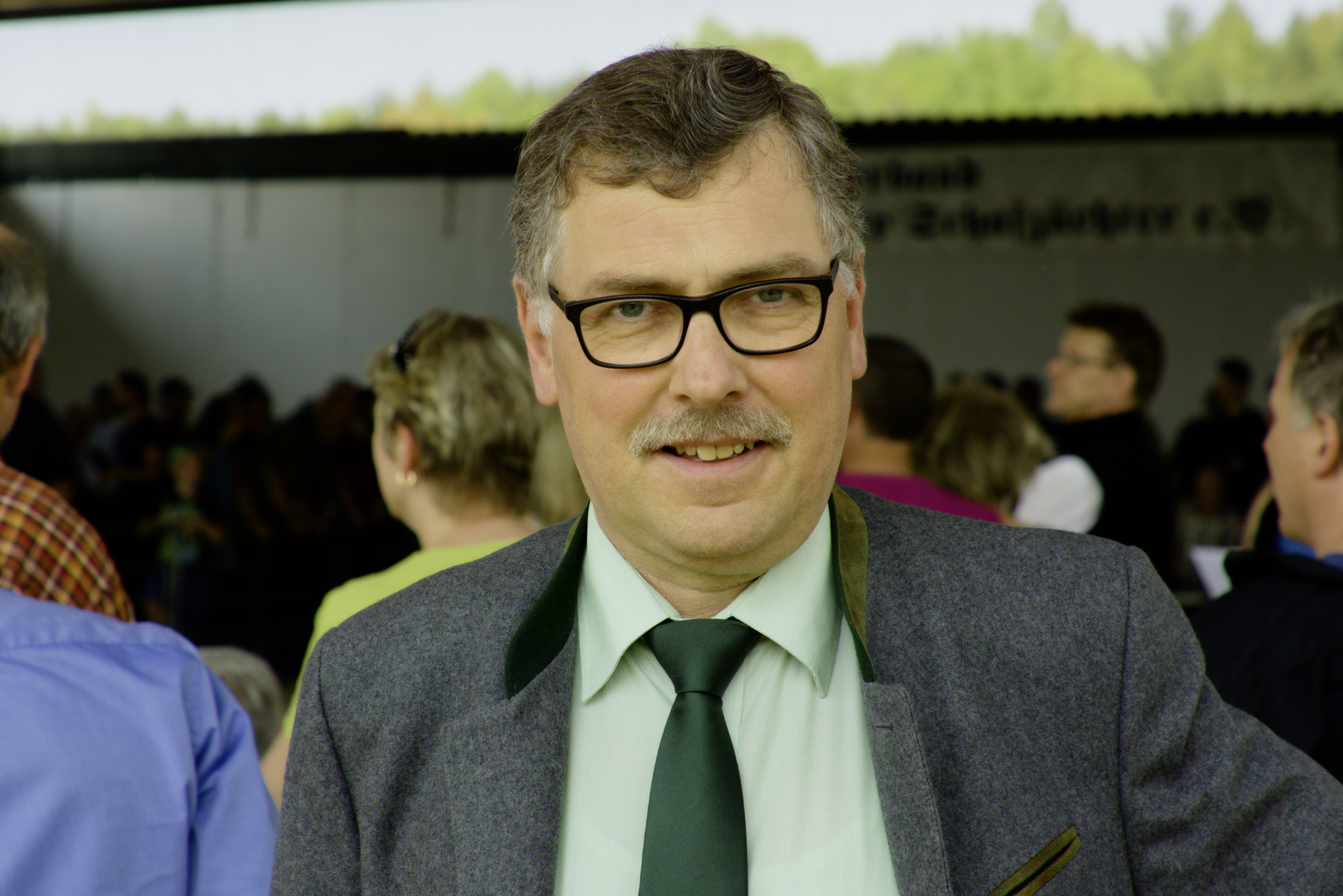 Reinhard Krebs, Landrat des Wartburgkreis in Thüringen